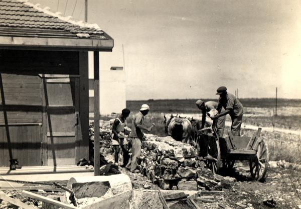 מפחד התקפות של הערבים היה צורך לבצר ולבנות מסביב לכל צריף מגורים חומת אבן שהגנה על יושבי הצריף.